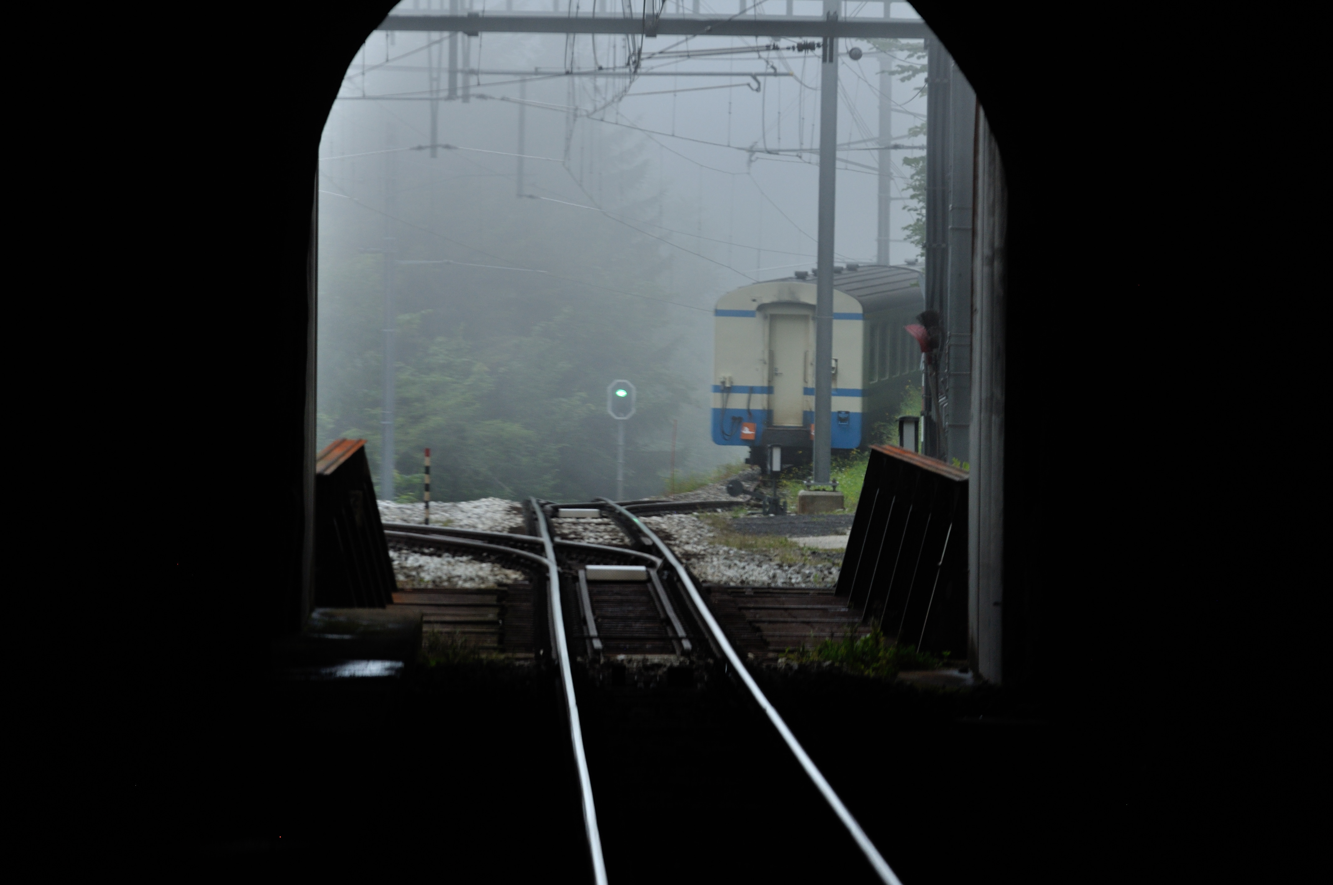 Switzerland, Vaud, impressions from the drivers cabin on the Chemin de fer Montreux Oberland bernois. For exact location see geodata. Vue sur la sortie du tunnel de Jaman et la halte de Jor.